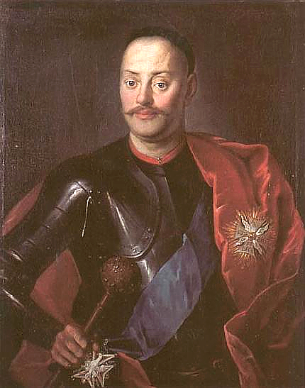 Janusz Sanguszko